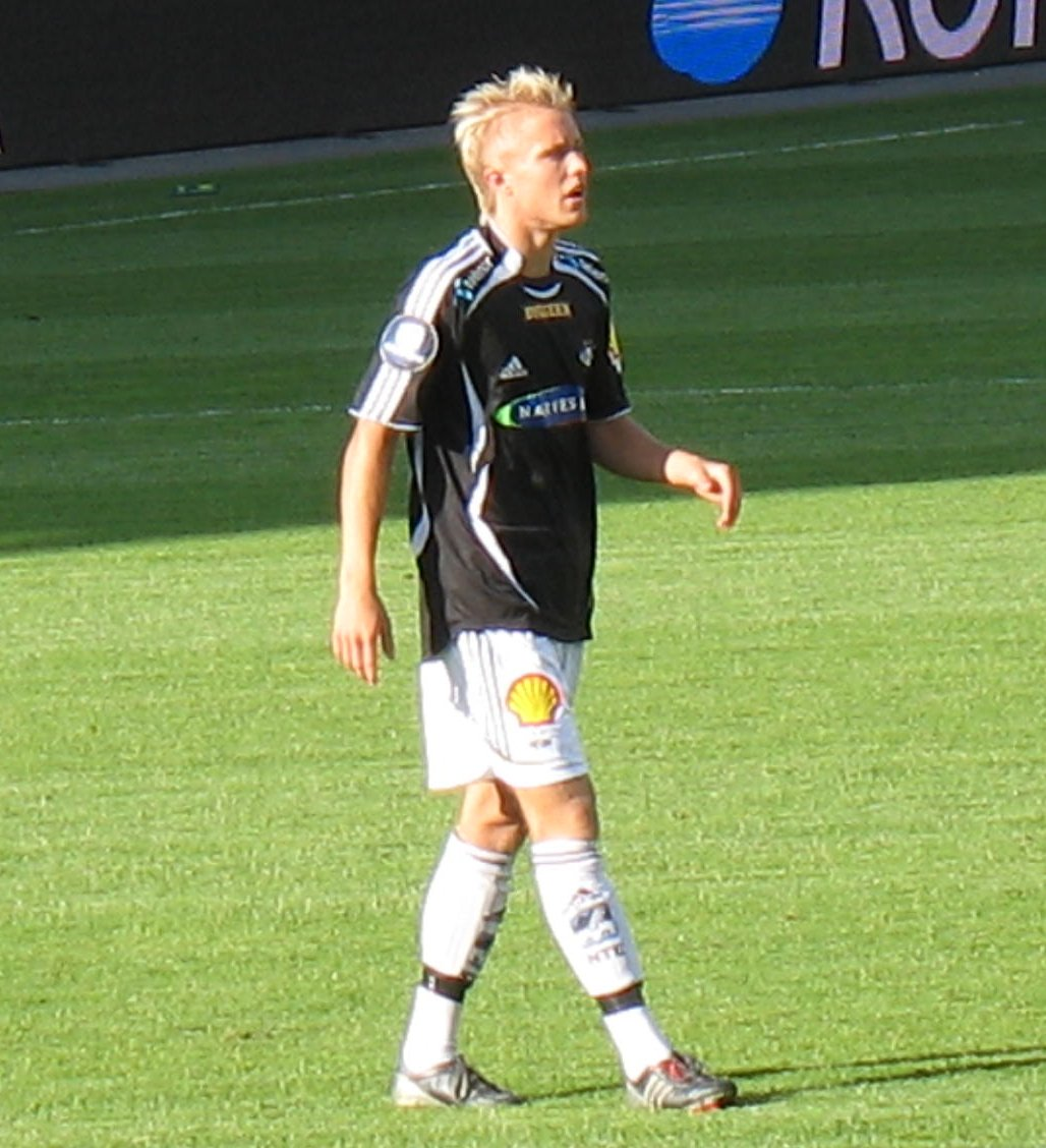 Fotballspilleren Per Ciljan Skjelbred